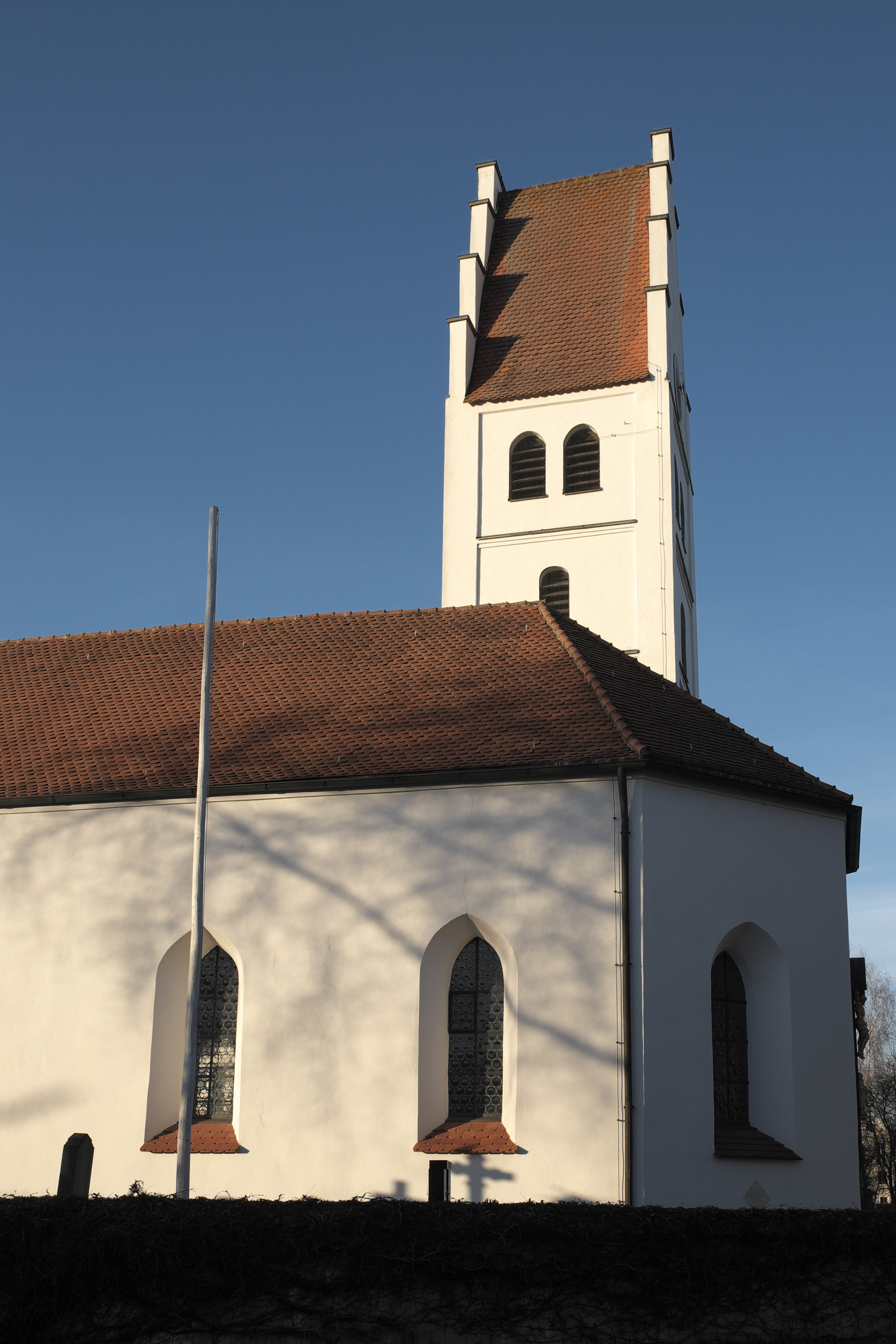 Katholische Pfarrkirche Mariä Heimsuchung in Euernbach, einem Ortsteil von Scheyern im Landkreis Pfaffenhofen an der Ilm (Bayern/Deutschland)